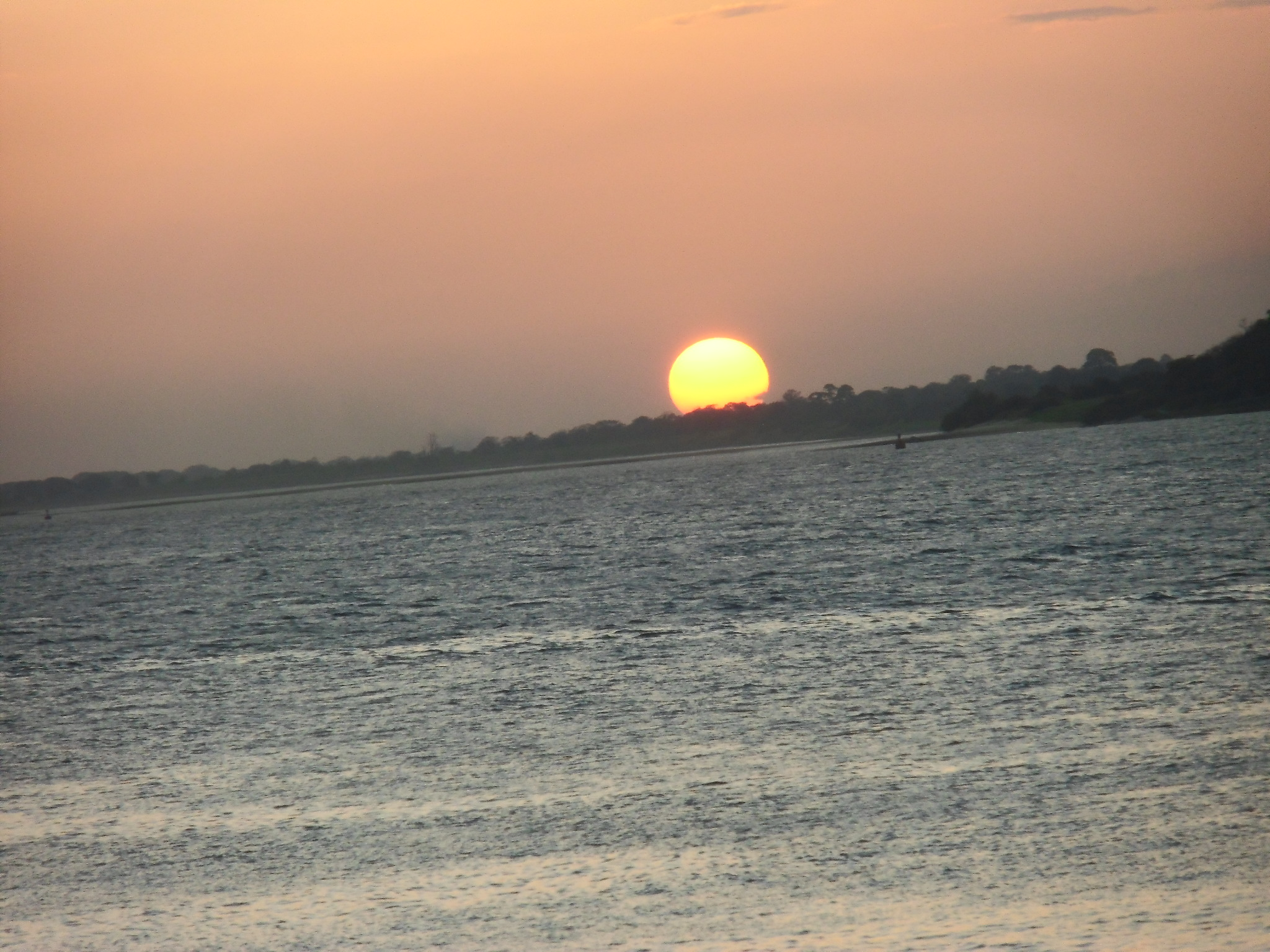 Beautiful sunsets against the Orinoco and Caroni rivers fente the Ferry Terminal and Chalanas, San Félix.